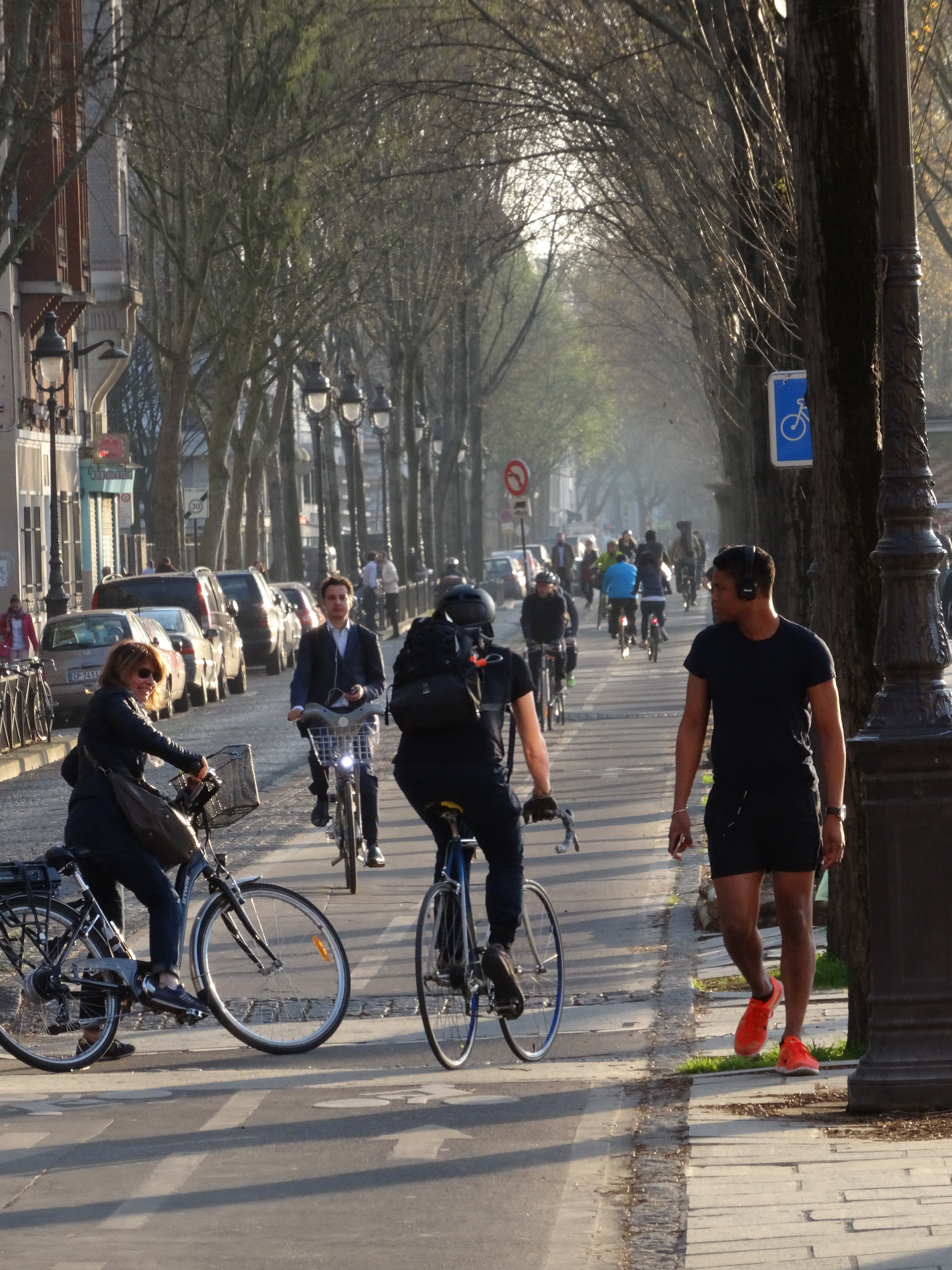 Canal de l'Ourcq